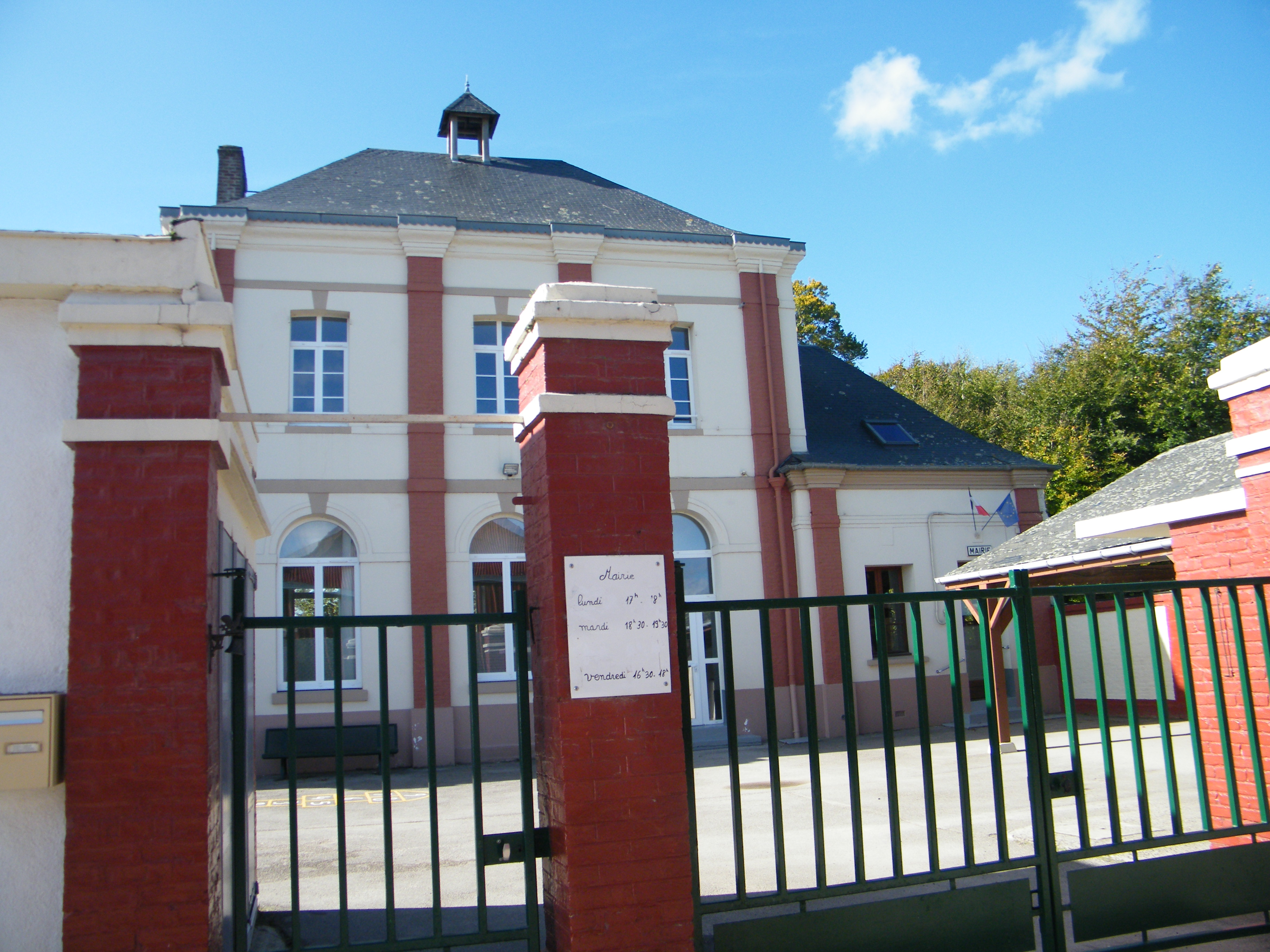 Vaudricourt, Somme, Fr, mairie-école.